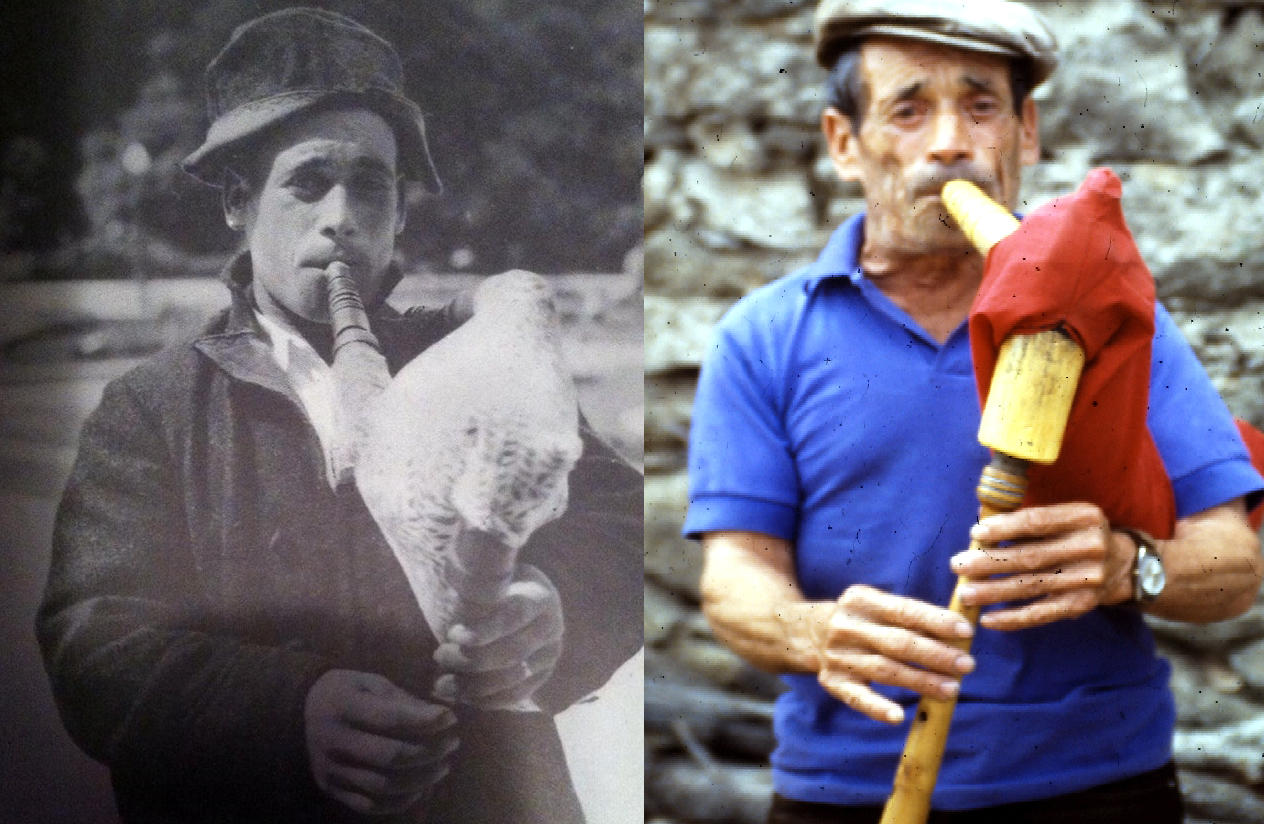 Pascoal, anos 60 e 90